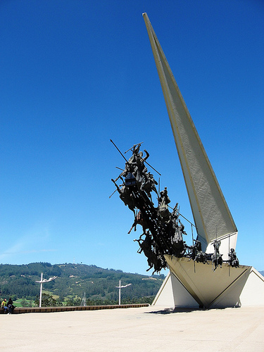 Pantano de Vargas, donde se gesto la batalla de los catorce lanceros que nos llevo a la libertad